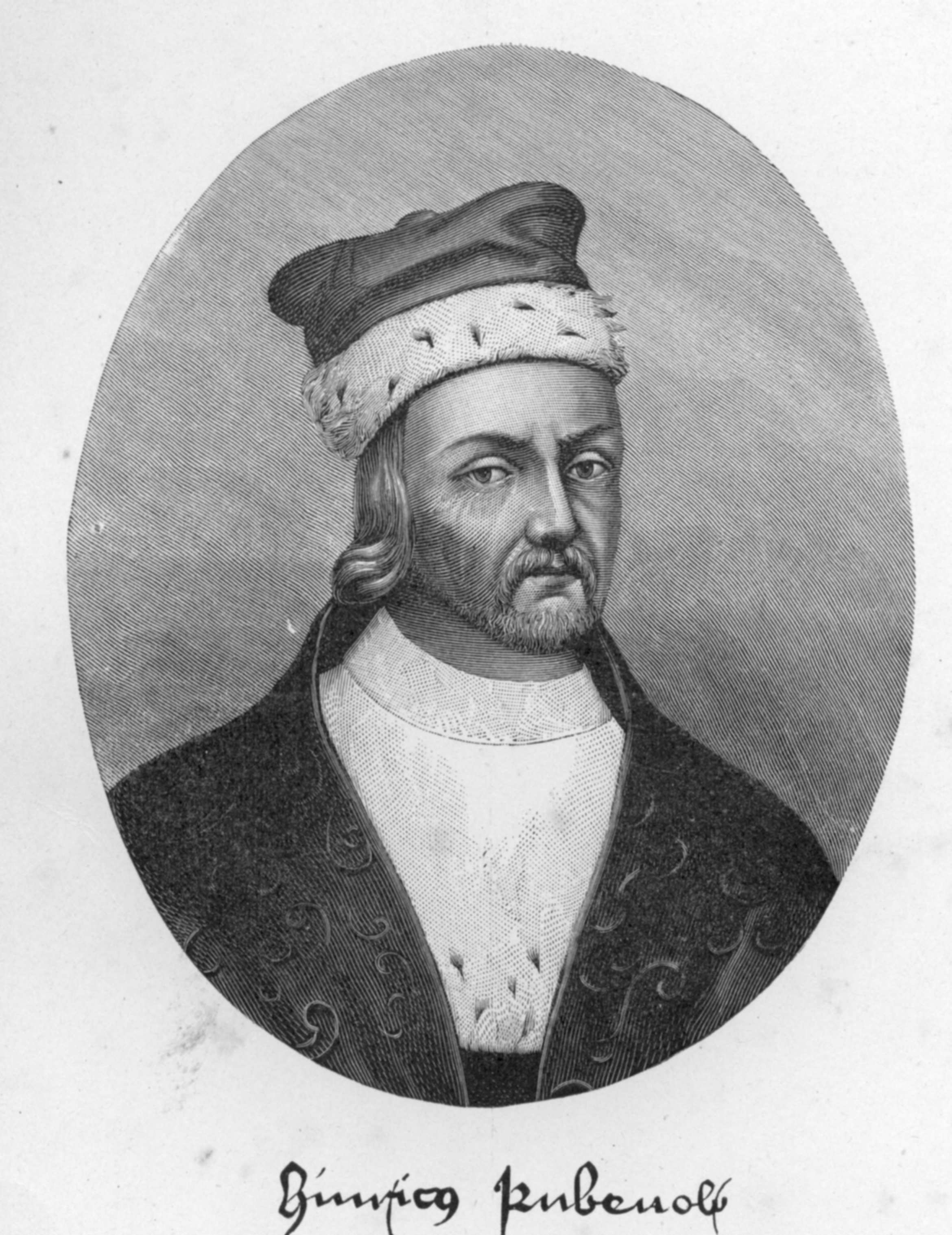 Heinrich Rubenow um 1460